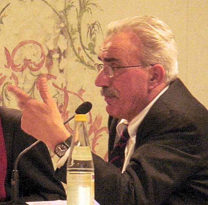 Marzio Breda durante la presentazione del libro In questo progresso scorsoio, a Conegliano nel maggio 2009, dov'è intervenuto col coautore, il poeta Andrea Zanzotto